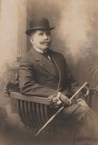 Enrique Villegas Encalada, empresario minero y político liberal chileno. Nació en Quillota, el 15 de julio de 1839. Falleció en Viña del Mar, el 14 de julio de 1916